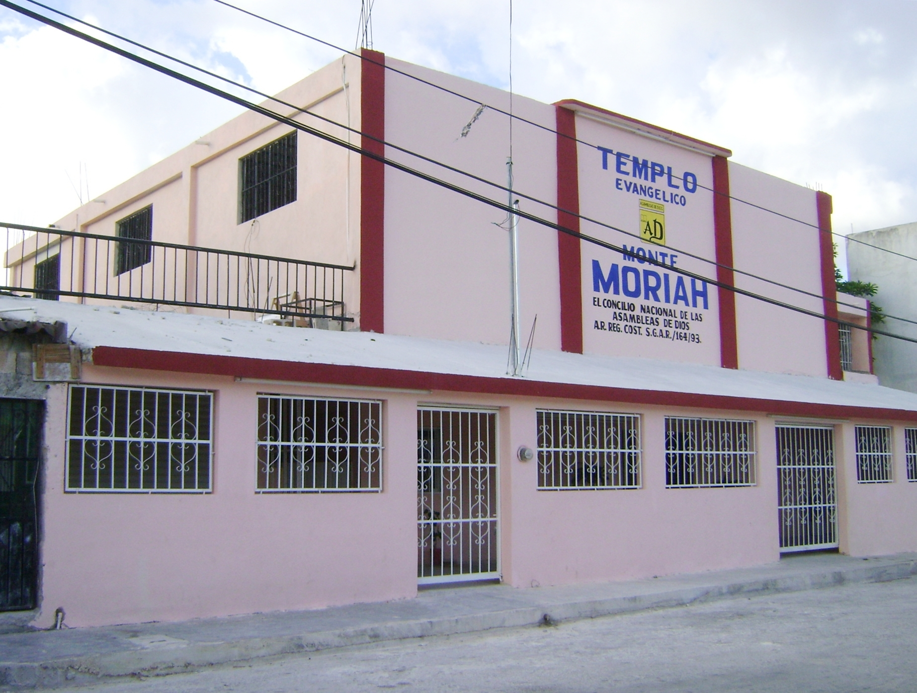 Templo Evangélico Monte Moriah de El Concilio Nacional de las Asambleas de Dios, A.R. Cancún, Quintana Roo, México.